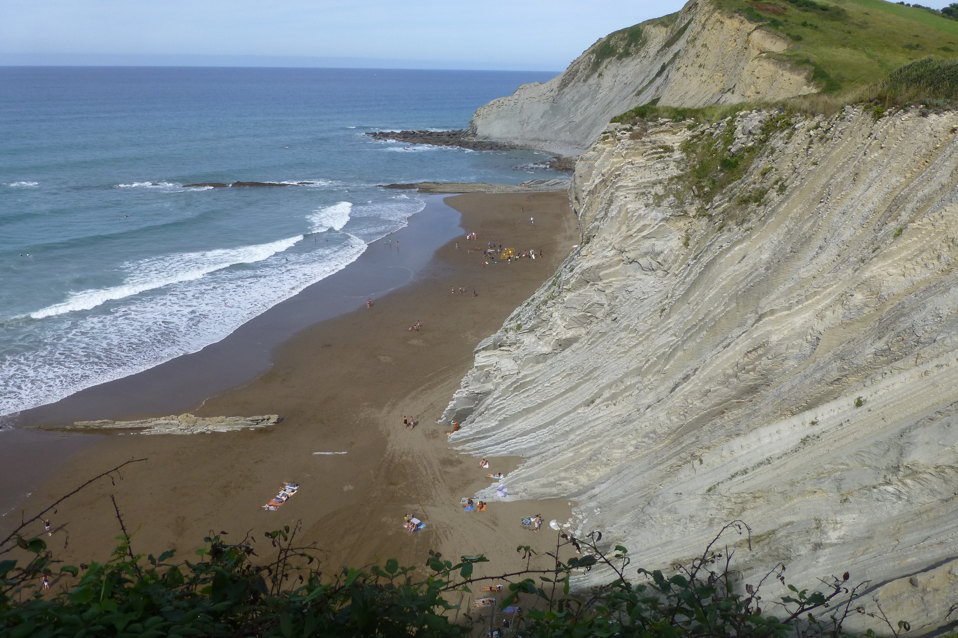 Playa de Itzurun y Flysch en Zumaia, Gipuzkoa, en el País vasco (España).